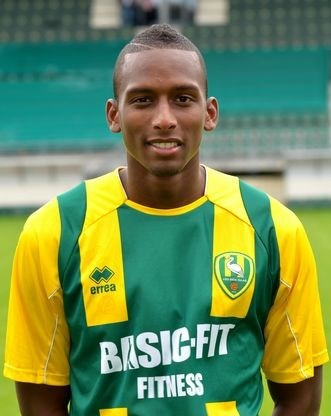 Dion Malone